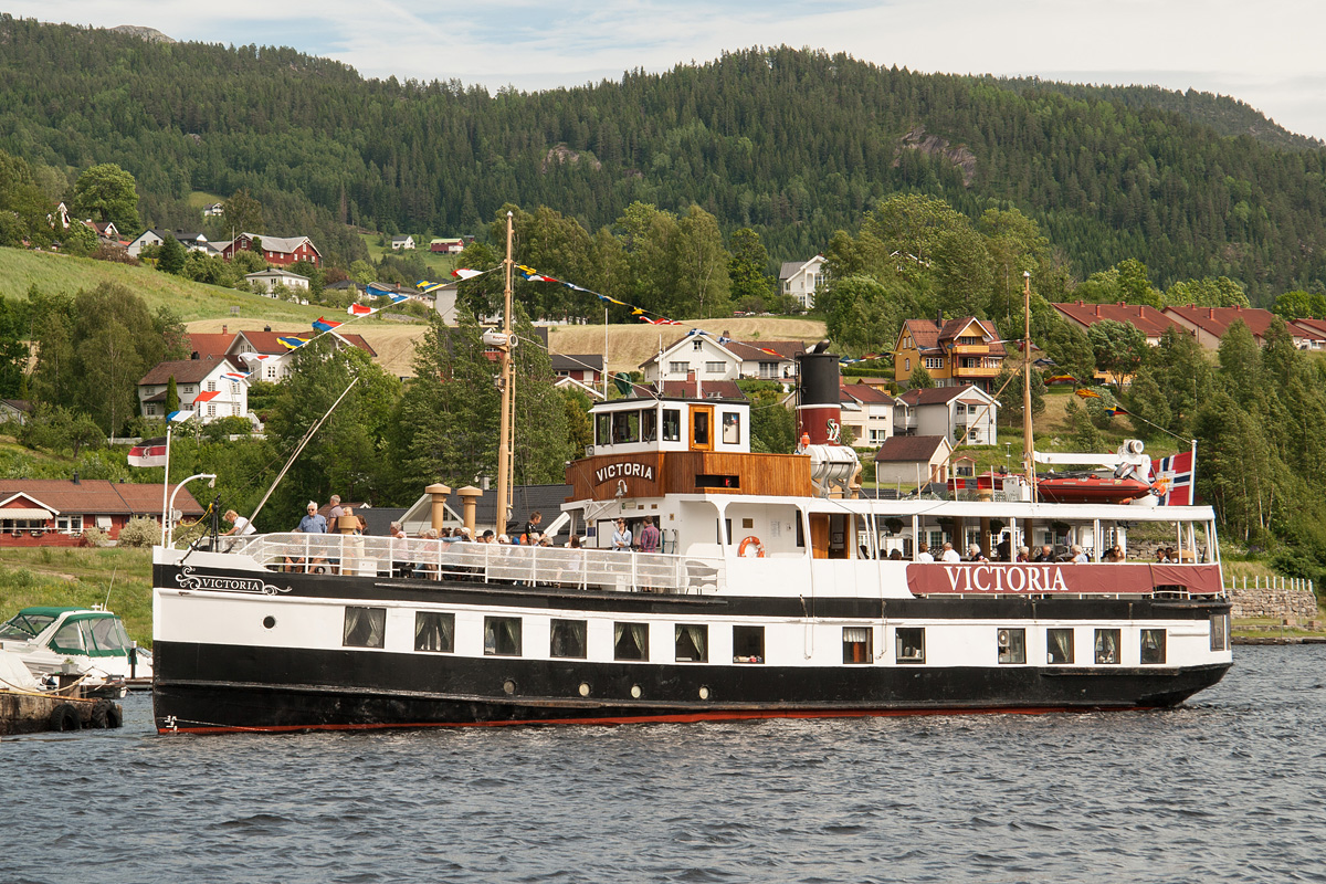 MS «Victoria» bakker ut fra Kviteseid brygge.